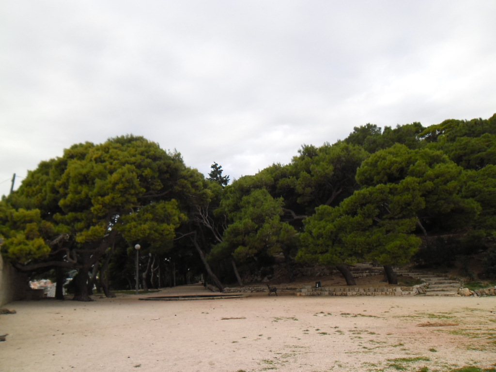 park Gradac poviše plaže Danče, Dubrovnik